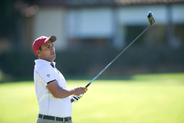 Viraat Badhwar